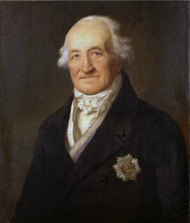 Anton von Cetto (1756-1847) Öl auf Leinwand, 70,5 x 58,8 cm